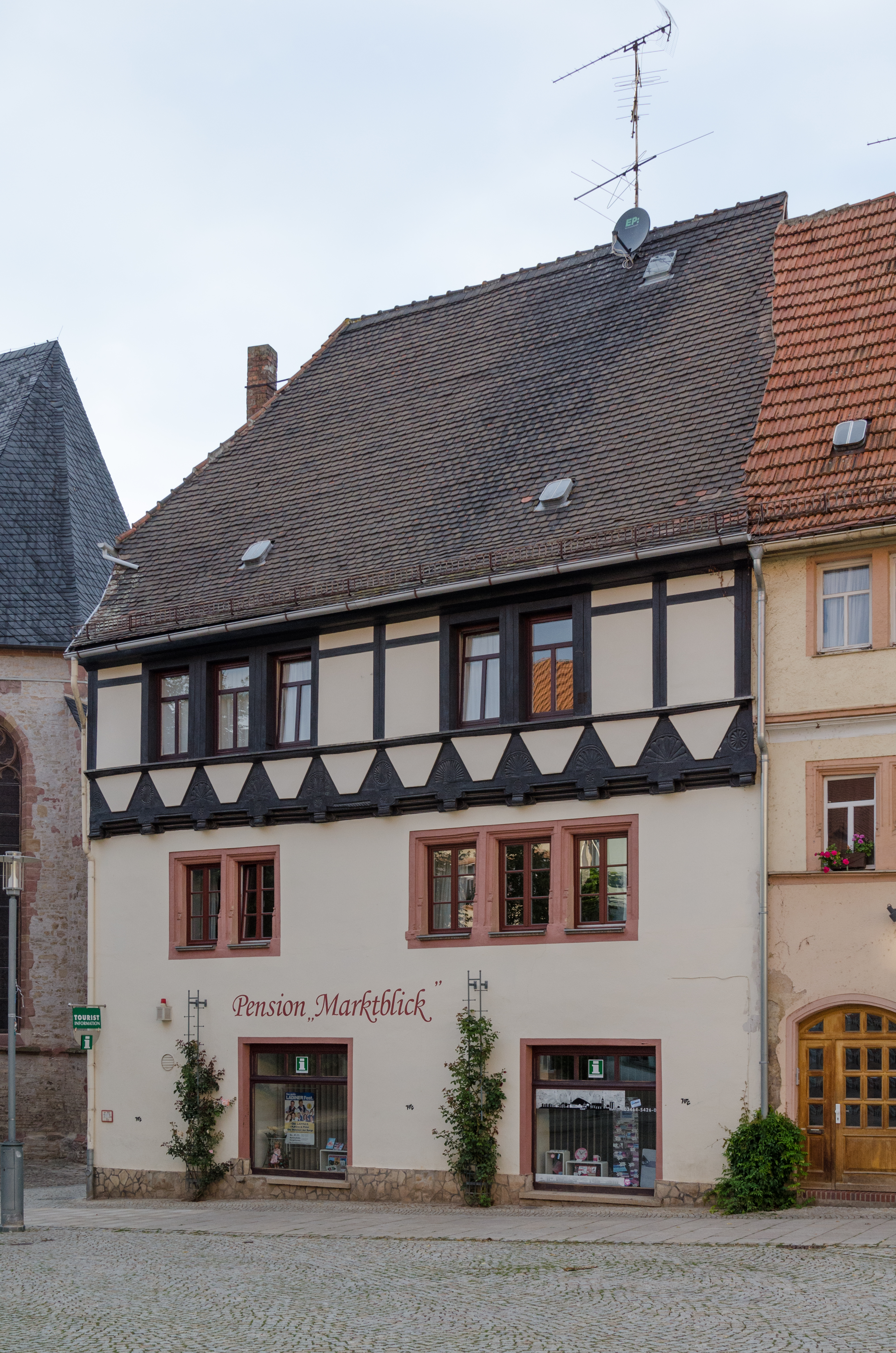 Sangerhausen, Markt 18